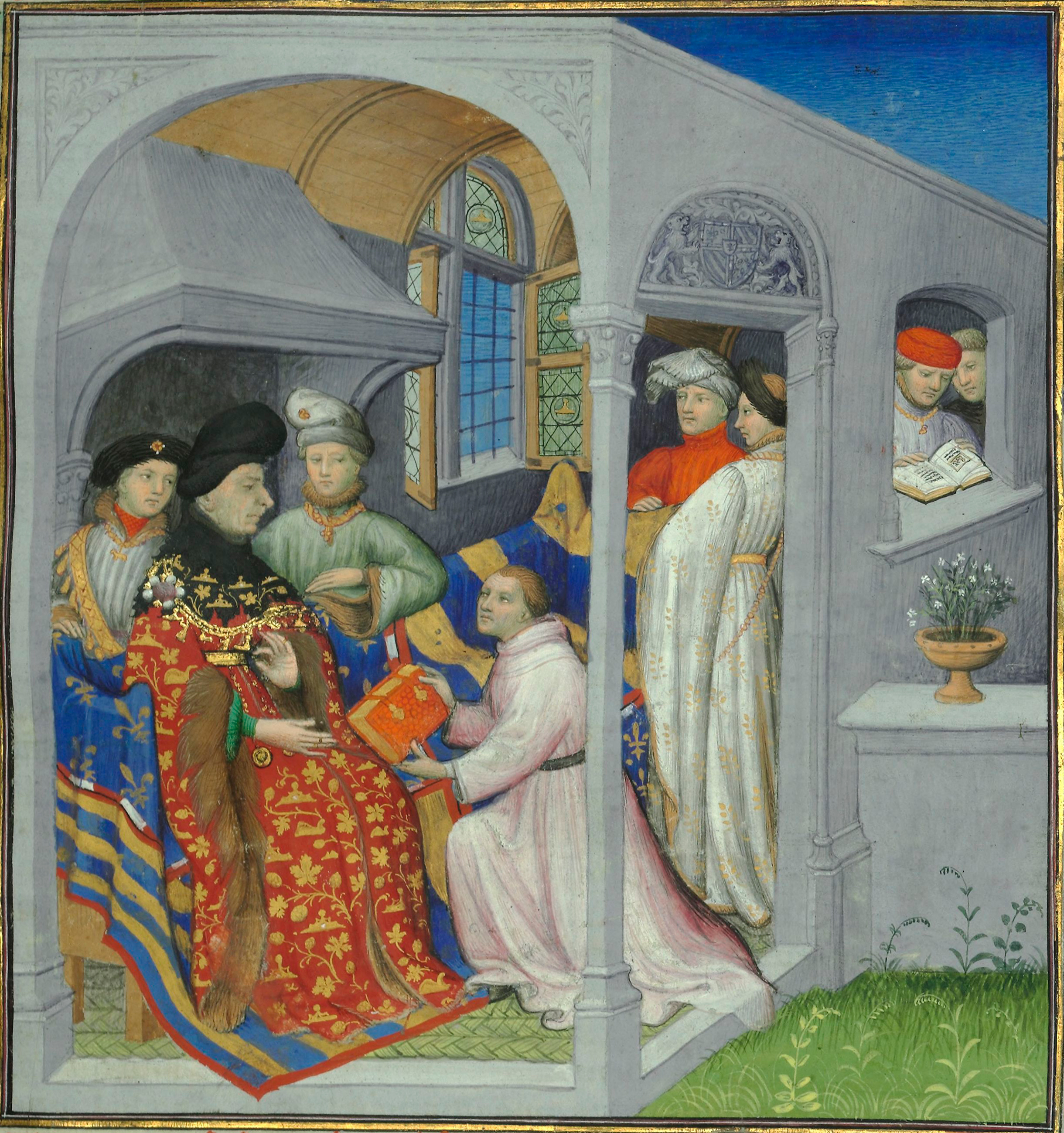 Frontispice du livre du frère Hayton (détail) : présentation du livre à Jean sans Peur. Recueil à destination de Jean sans Peur (